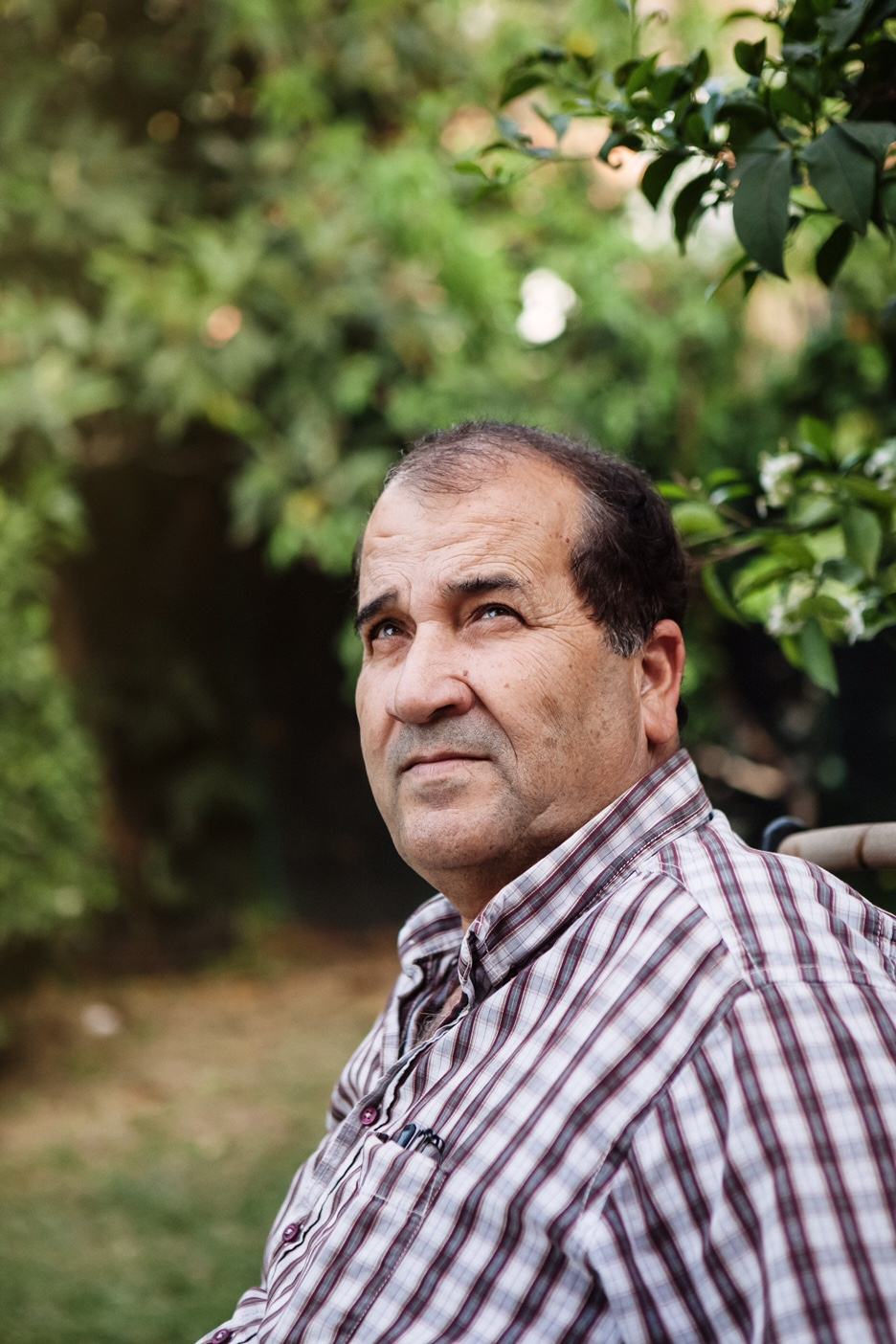 דוד ברבי.